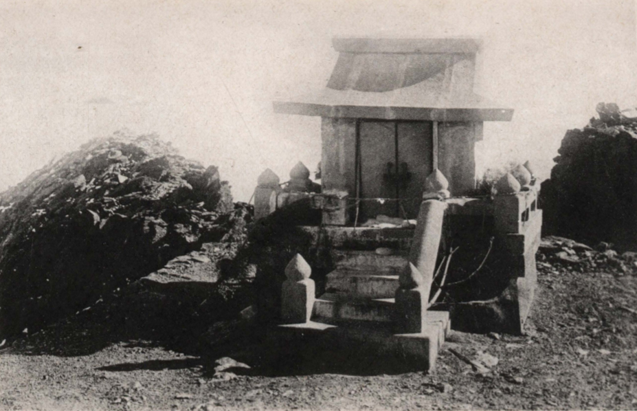 中文（台灣）: 位於台中州新高郡新高山上的神社